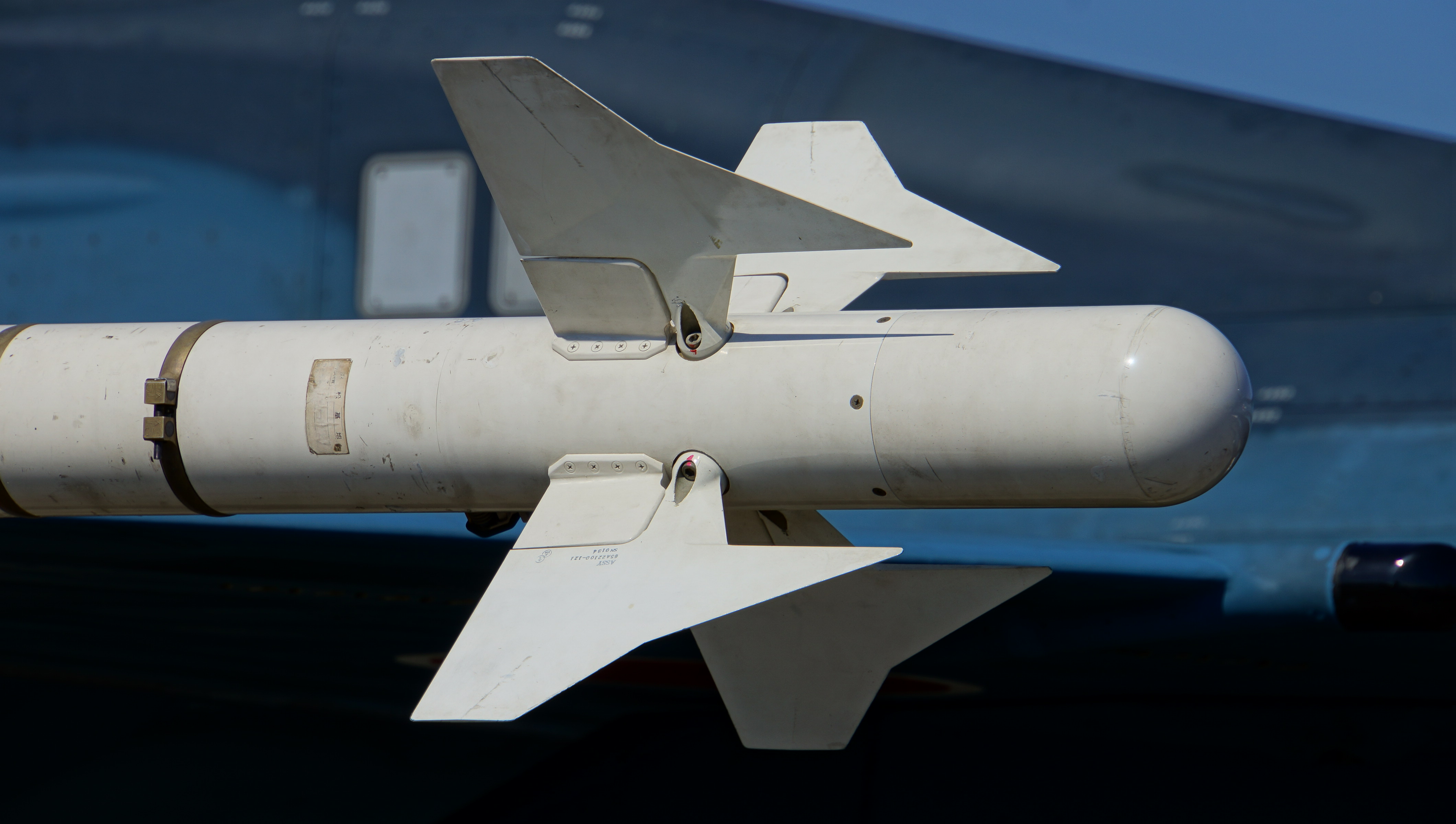 航空自衛隊 F-2A戦闘機に搭載されているAAM-3空対空ミサイル 前部カナード翼。 14年9月28日 浜松基地にて。